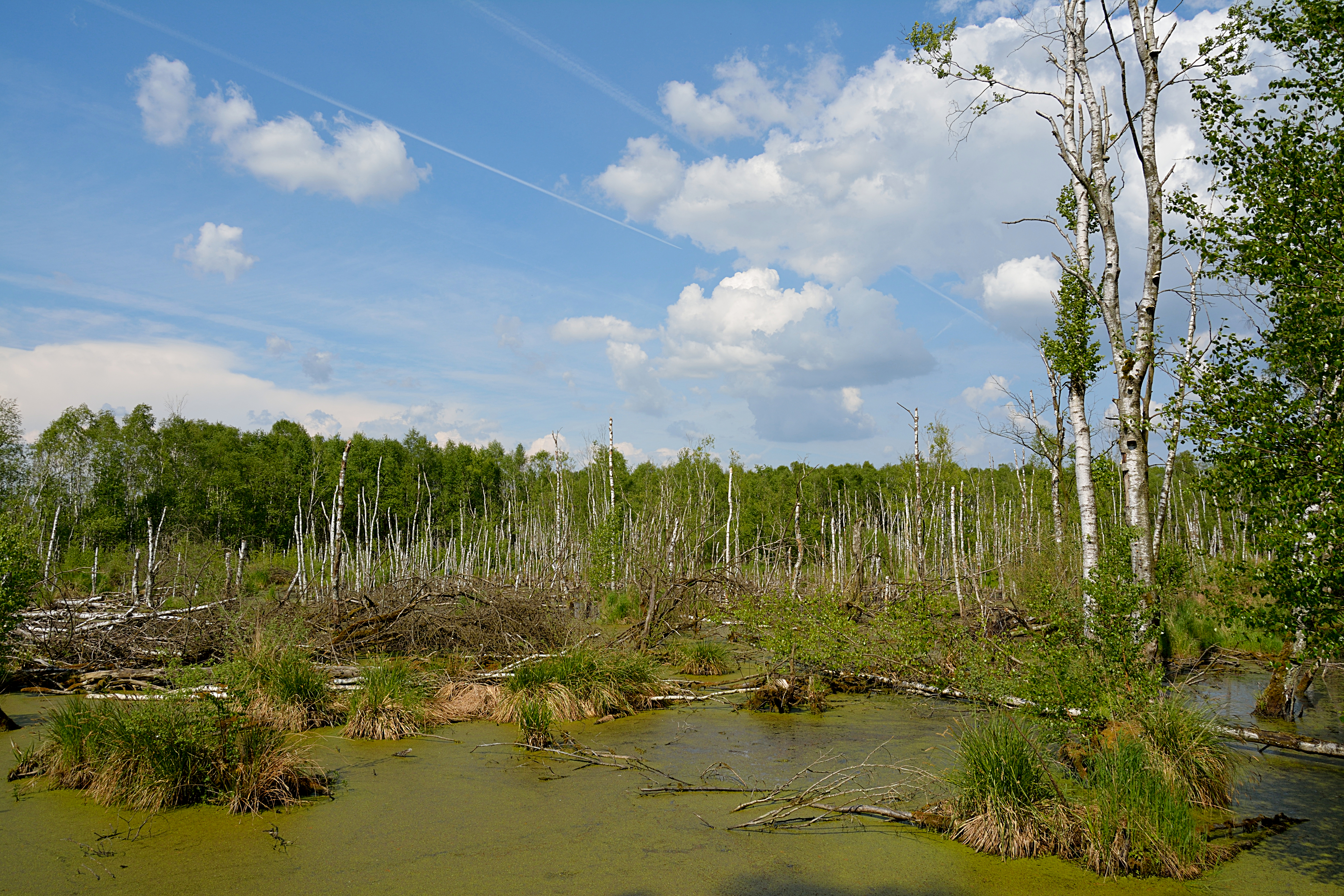 Impressionen aus dem FFH-Gebiet "Hasenmoor" im Kreis Segeberg, Schleswig-Holstein